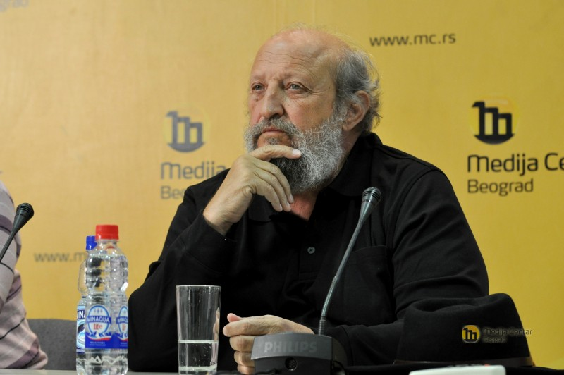 Petar Božović - srpski glumac